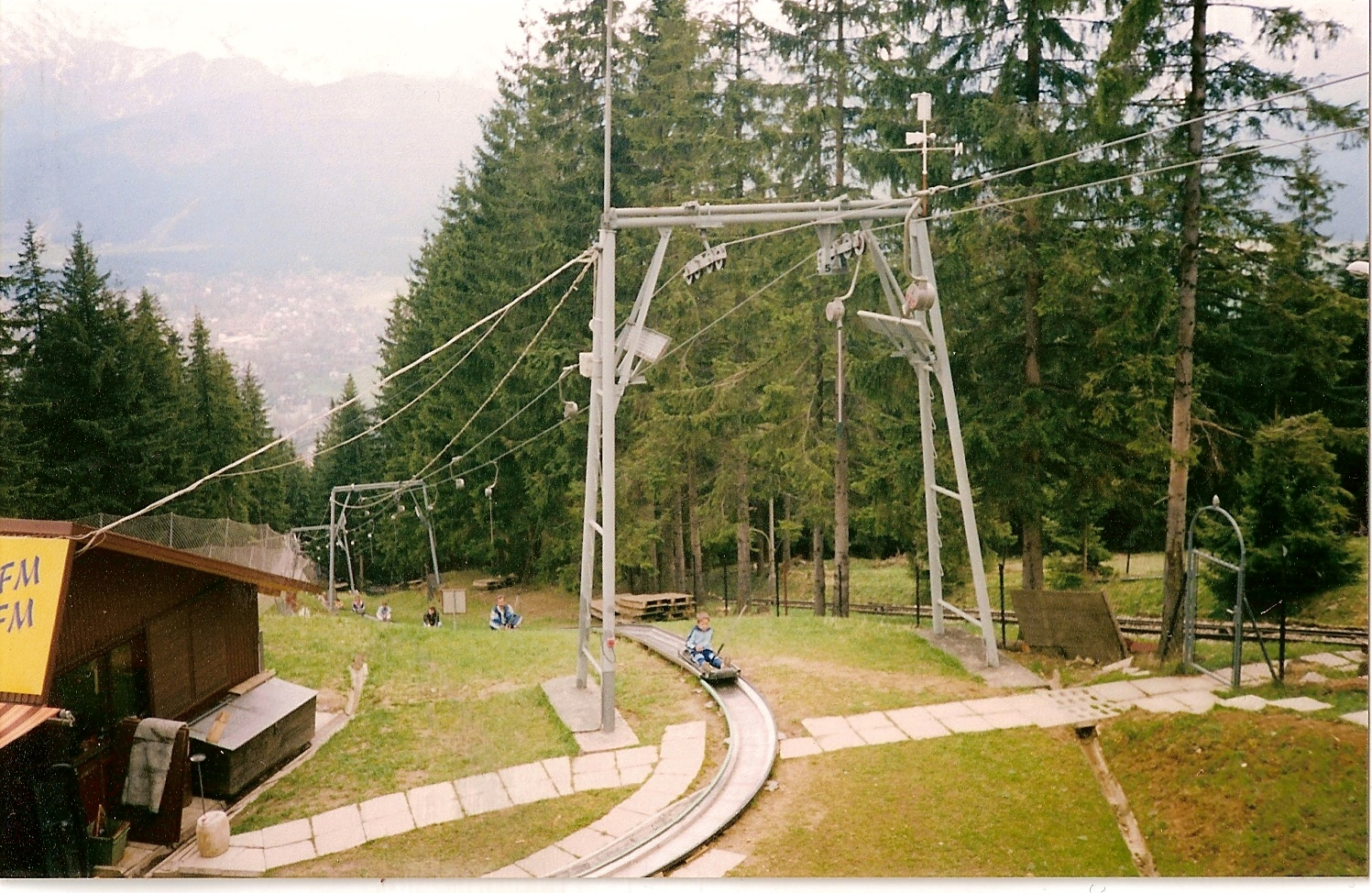 Zjazd rynnowy na Gubałówce, wraz z kawałkiem panoramy.